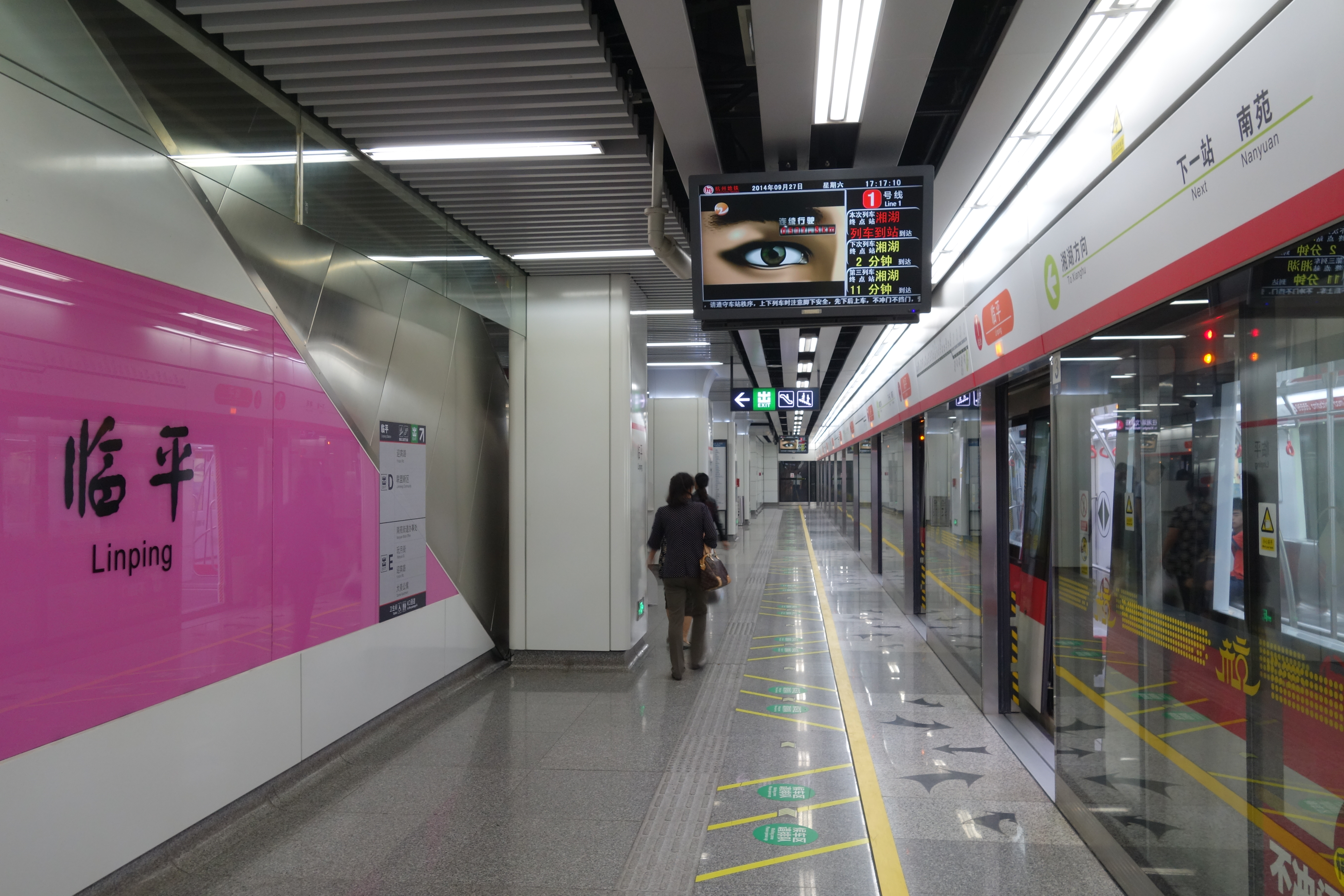 临平站大字壁